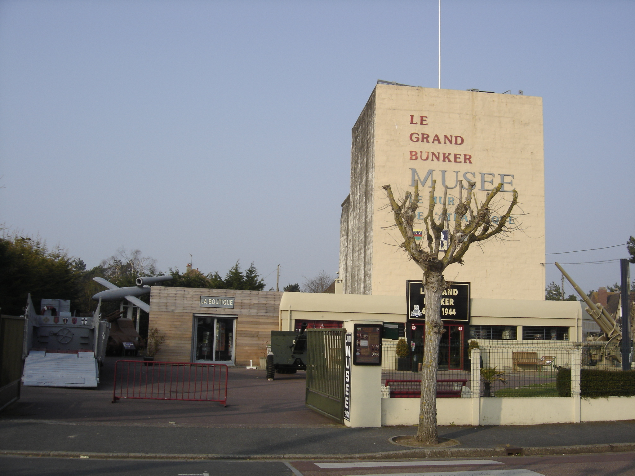 le Grand Bunker à Ouistreham, actuel musée du mur de l'atlantique